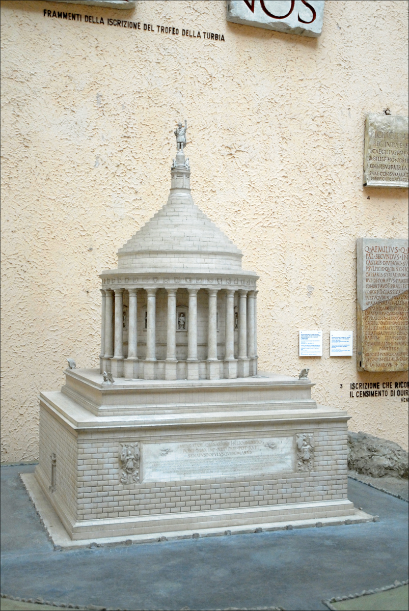 Le trophée des Alpes à la Turbie près de Nice célébrant la soumission des peuples des Alpes par Auguste. Article de Wikipedia Le musée du Trophée d'Auguste à la Turbie